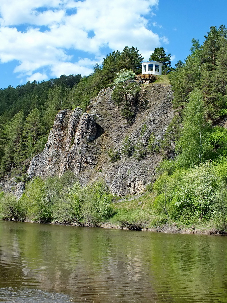 Скала Три сестры: Сухоложский район, Свердловская область This image is related to the protected area of Russia number 6610620